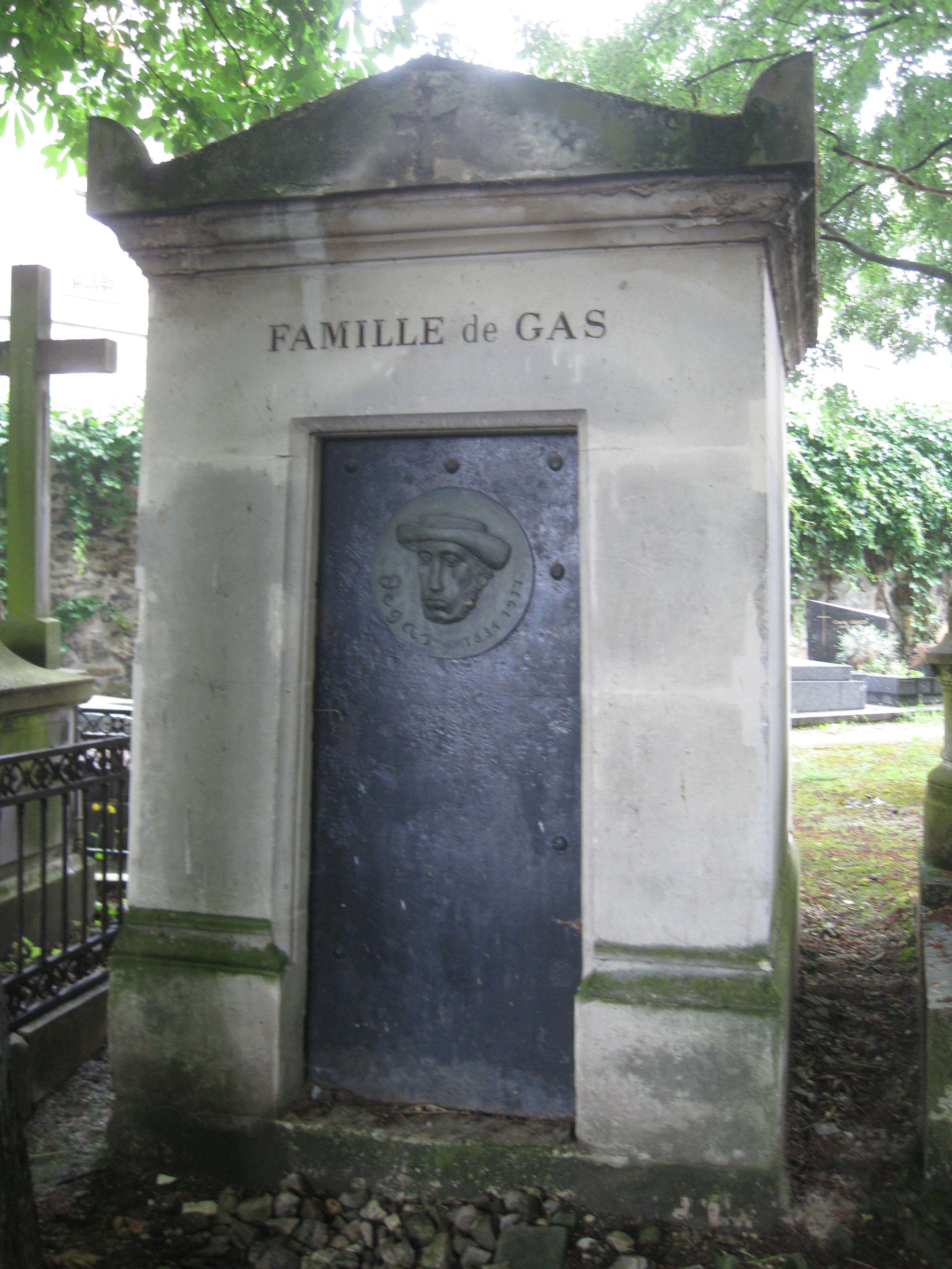 画家・エドガー・ドガの墓